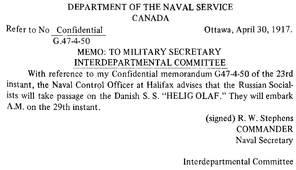 Canadian Report on Continuation of Homeward Journey by Trotsky and other Interned Socialists (1917)